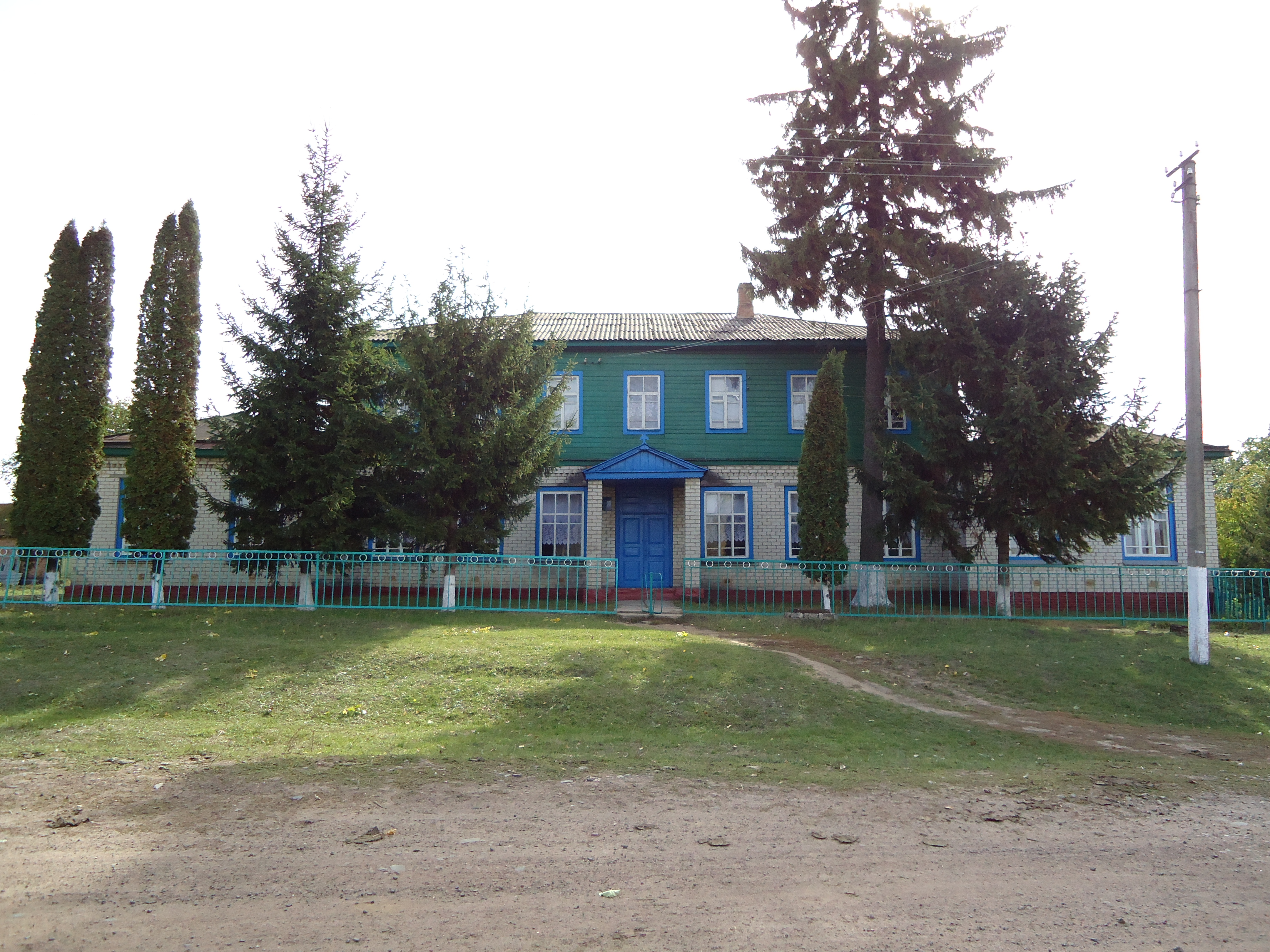 Фото Савинської ЗОШ I-III ст. (с. Савинці, Срібнянянський р-н, Чернігівська обл., Україна), зроблене фотокамерою Sony DSC-W320.